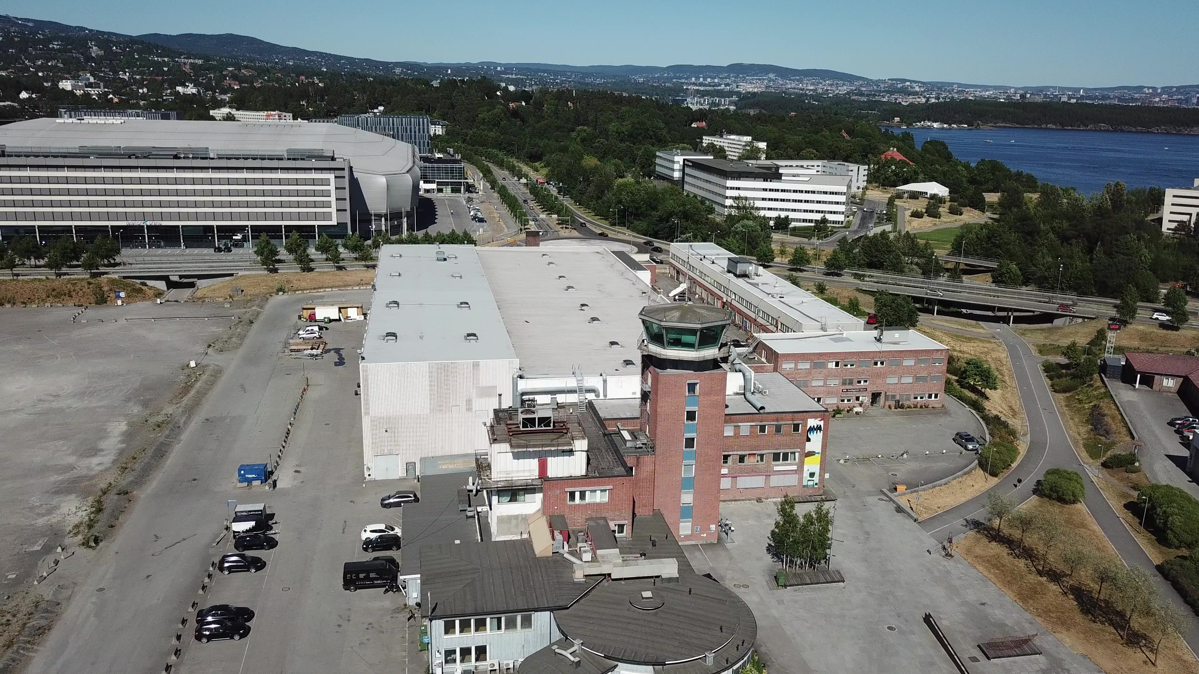 Flytårnet på gamle Fornebu Flyplass